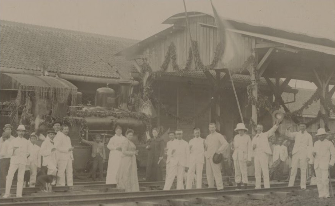 Opening van het station van de Nederlandsch-Indische Spoorweg Maatschappij te Tjepoe (Cepu) bij Blora, 1902, Collection Rob Niewenhuys